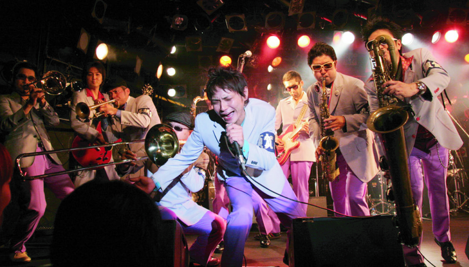 SHOW-SKAライブフォト。版権フリーのアーティスト写真。